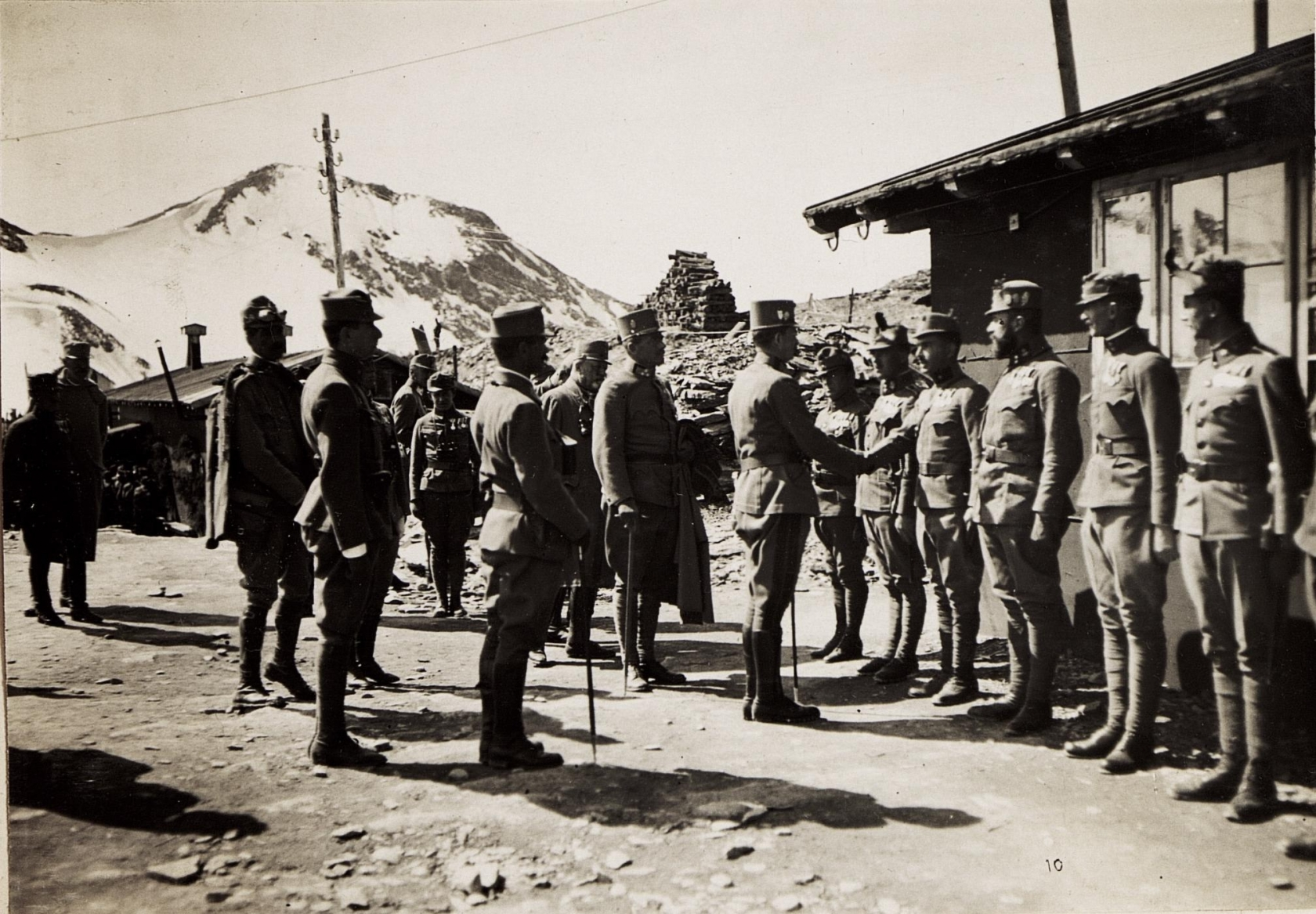 Südtirol 13/16.9.17.